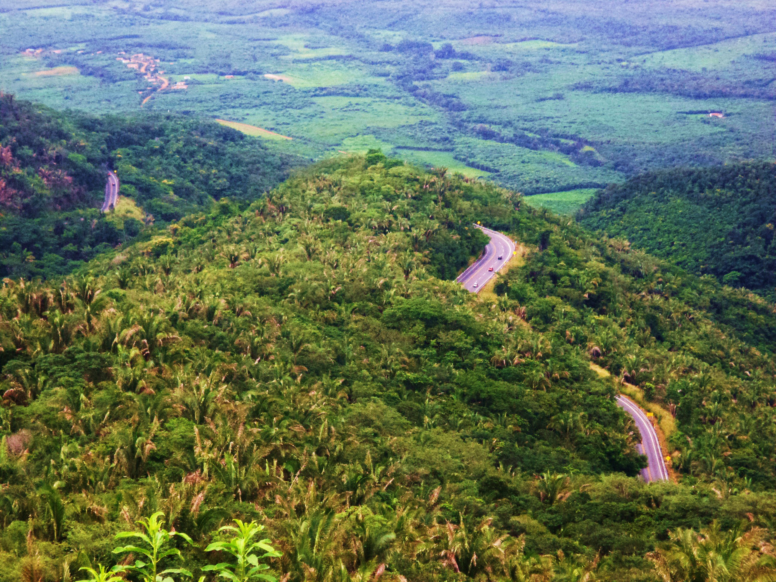 Unidade de Conservação Federal - Área de Proteção Ambiental da Serra da Ibiapaba. Município de Tianguá, Ceará